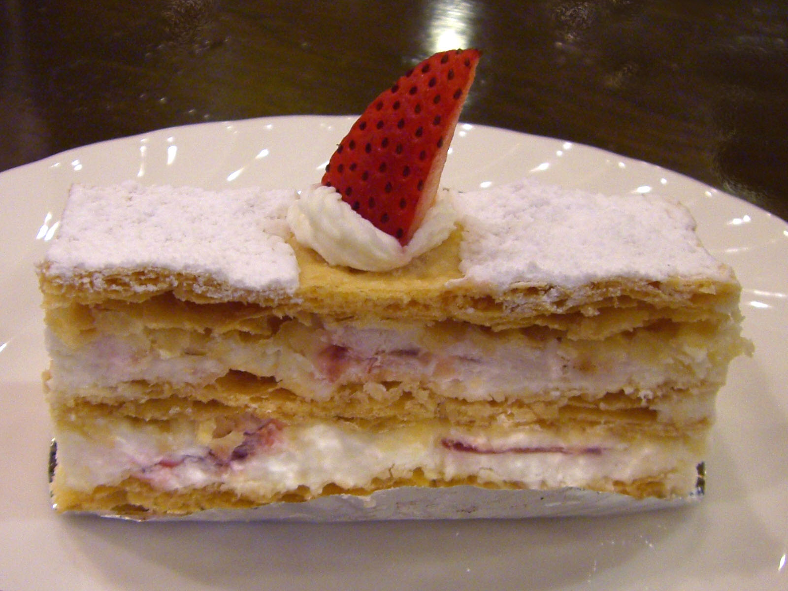 a Mille-feuille cake